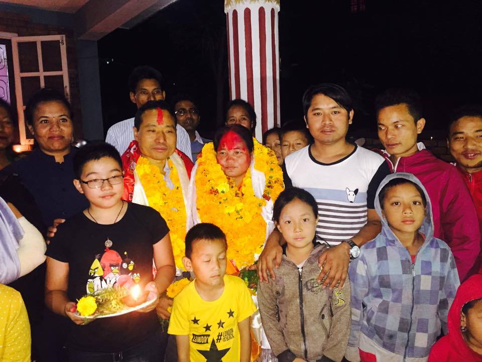 नेपाली: ओनसरी घर्तिमगर परिवारसँग